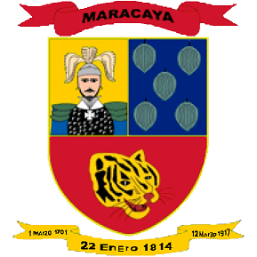 Escudo de la ciudad de Maracay